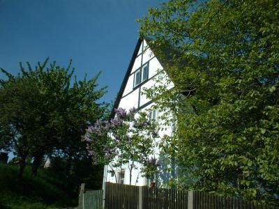 Quernerhaus